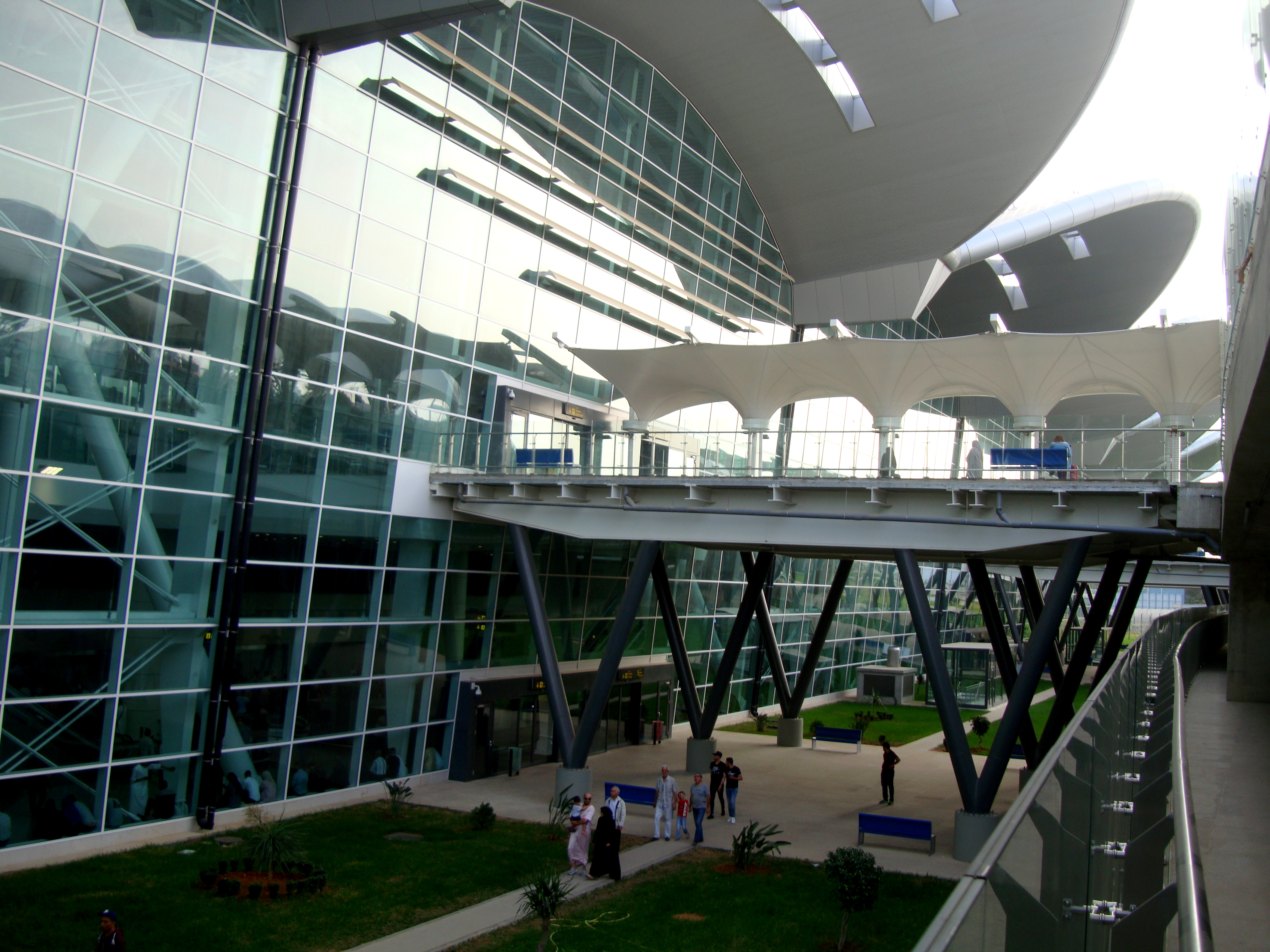 Terminal Ouest (Photo prise en juin 2019)